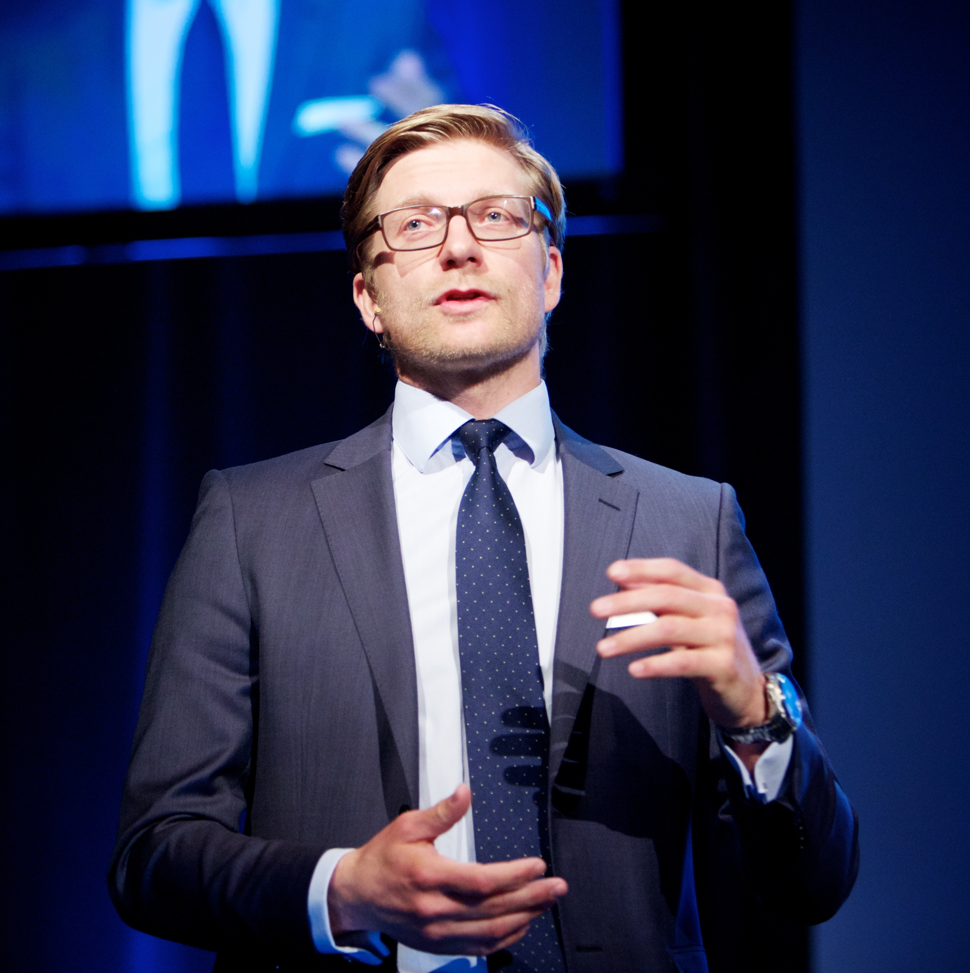 Medieundersøkelsen 2013, debatten. Ledet av Svein Tore Bergestuen, kommunikasjonsdirektør i SBS Discovery Norway.